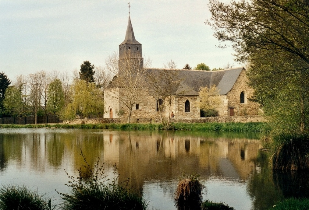 Ille-Et-Vilaine Longaulnay Eglise Saint-Lubin